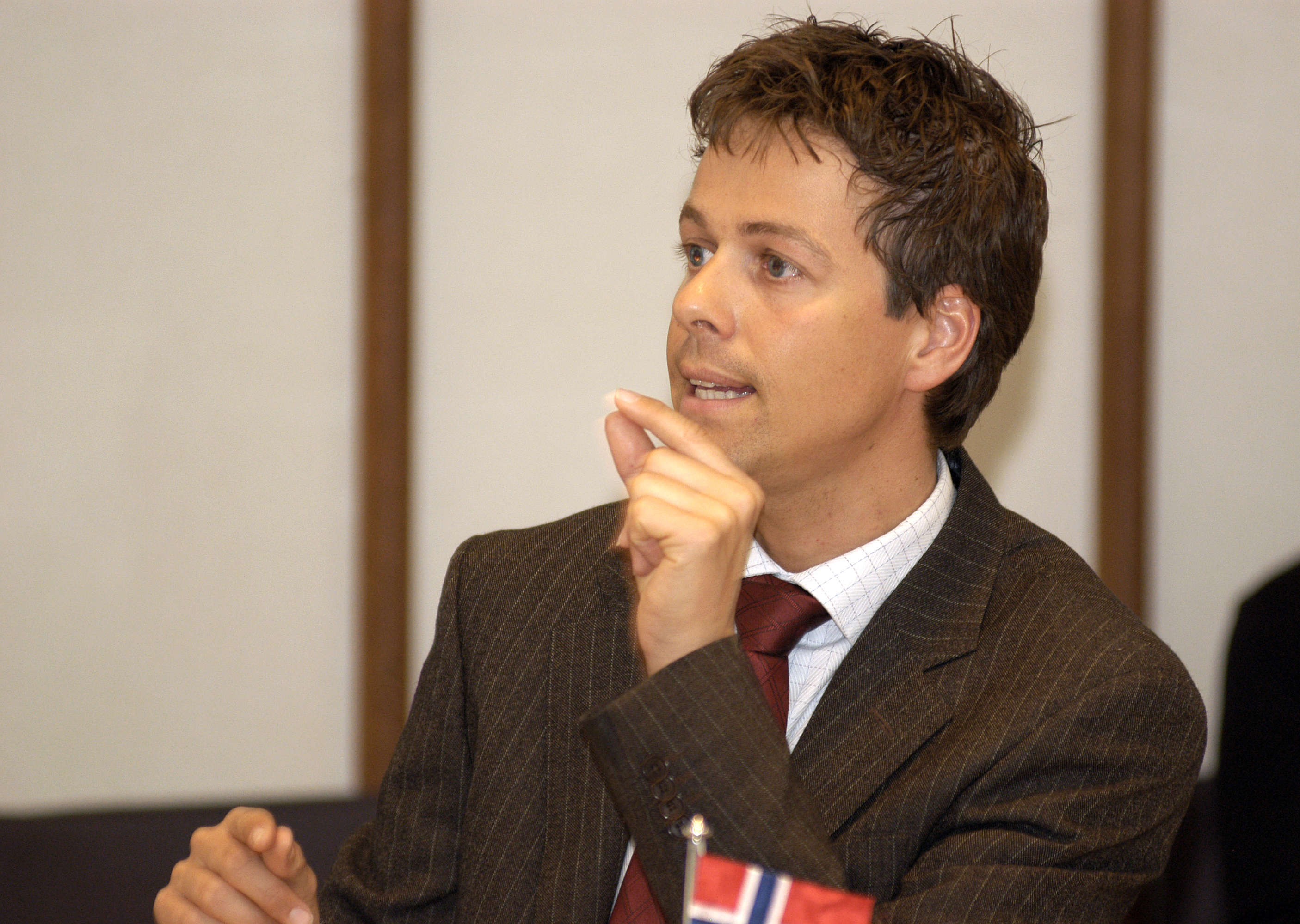 Knut Arild Hareide, Norges miljöminister, under miljöministermötet i Köpenhamn 2005-04-07.